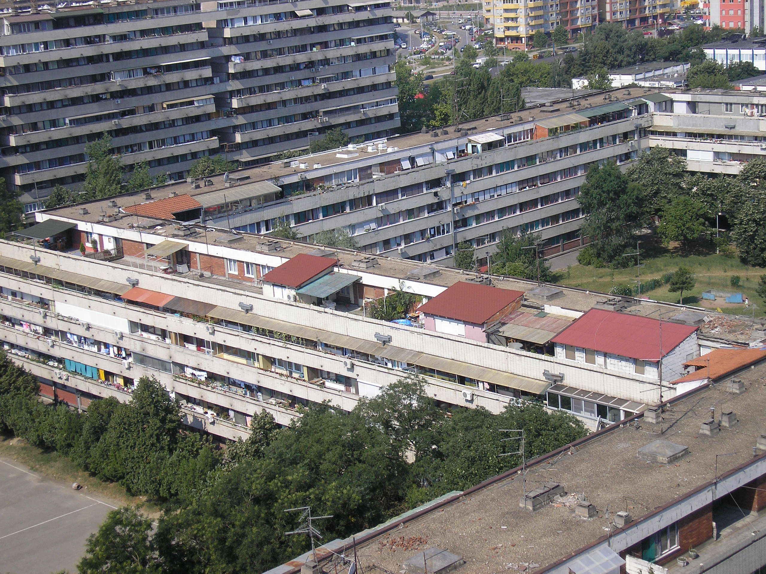 Bespravna gradnja na Novom Beogradu